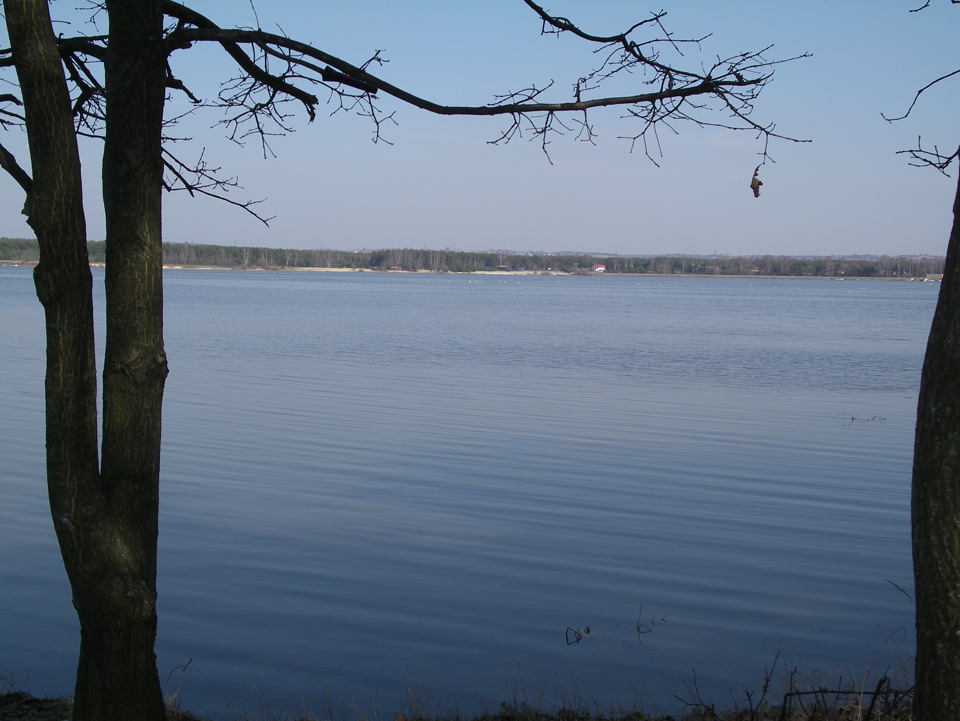 widok na Zbiornik Poraj